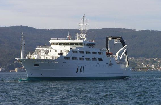 Buque Escuela y de Cooperación Pesquera, "Intermares A-41" en Ferrol, tras su entrega a la Armada Española.